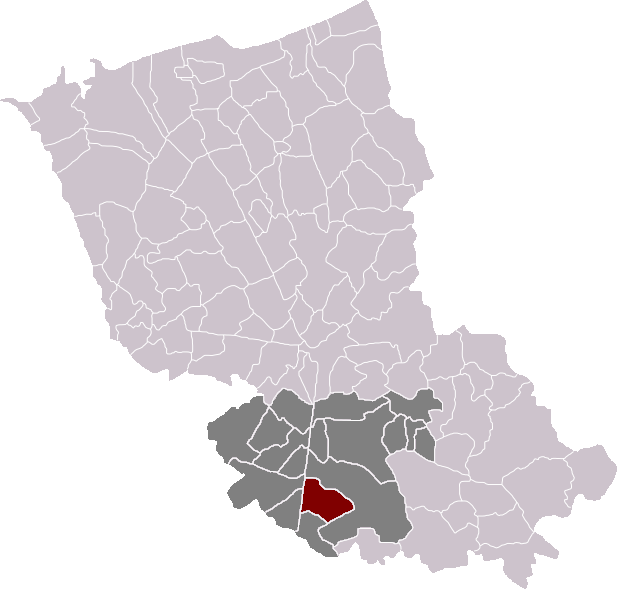 Locatie gemeente Steenbeke in arrondissement Duinkerke. Zelfgemaakt. Location of Steenbecque municipality in the arrondissement of Dunkirk. Self made. Localisation de la commune de Steenbecque dans l'arrondissement de Dunkerque. Fait moi-même.